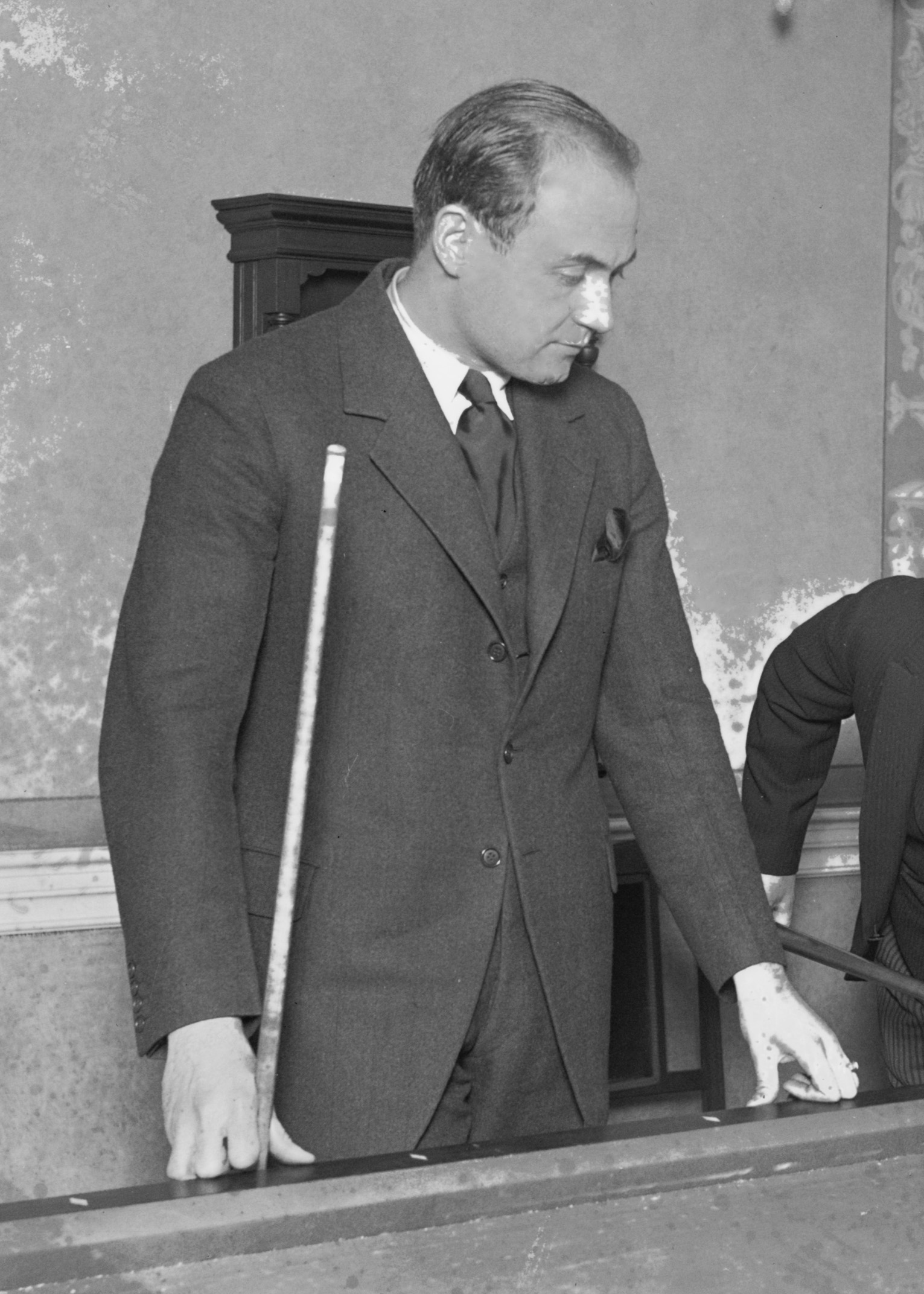 Depicted person: Manuel Y. de Negri